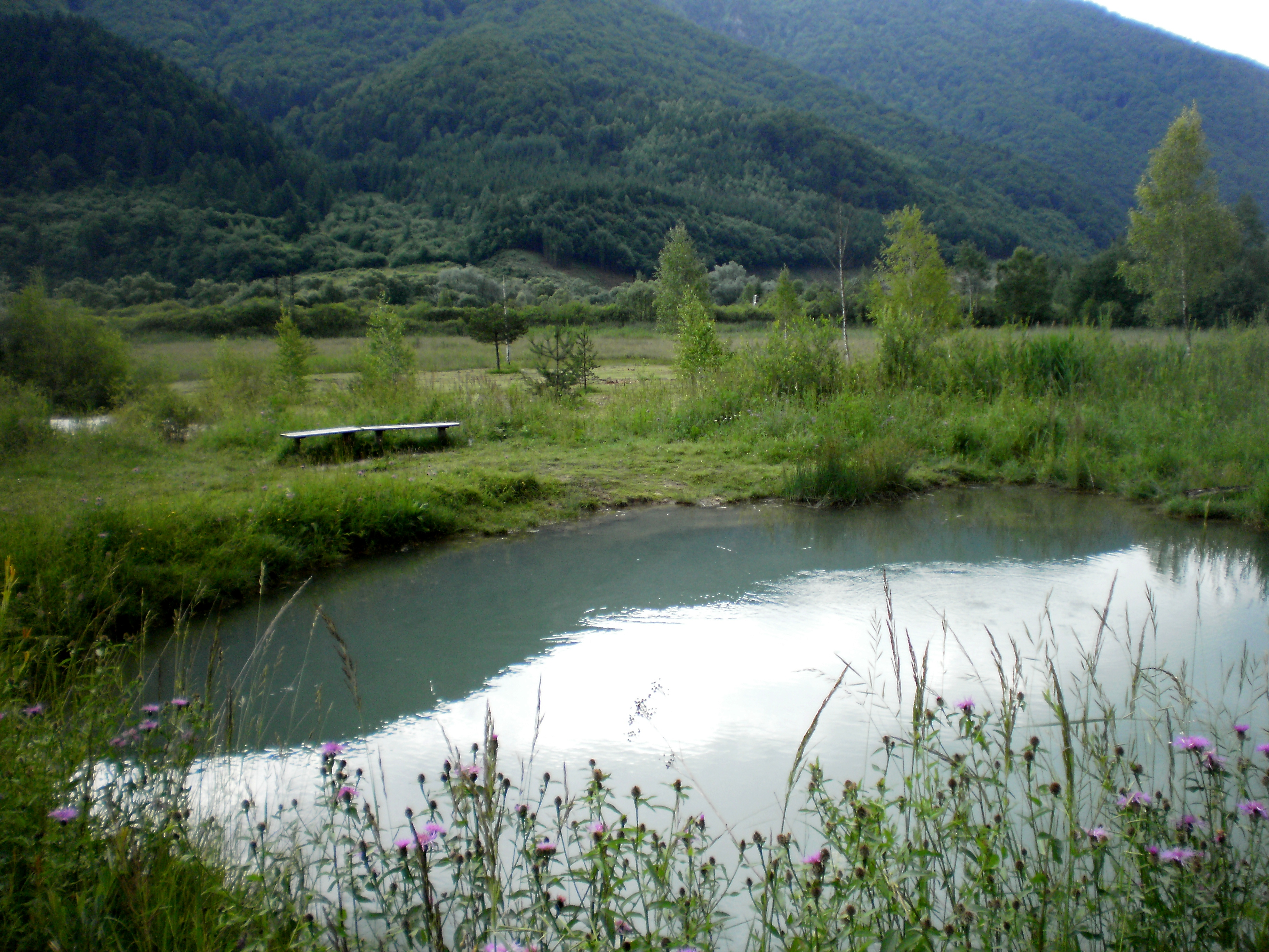 Bubľajúce (sírne) jazierko